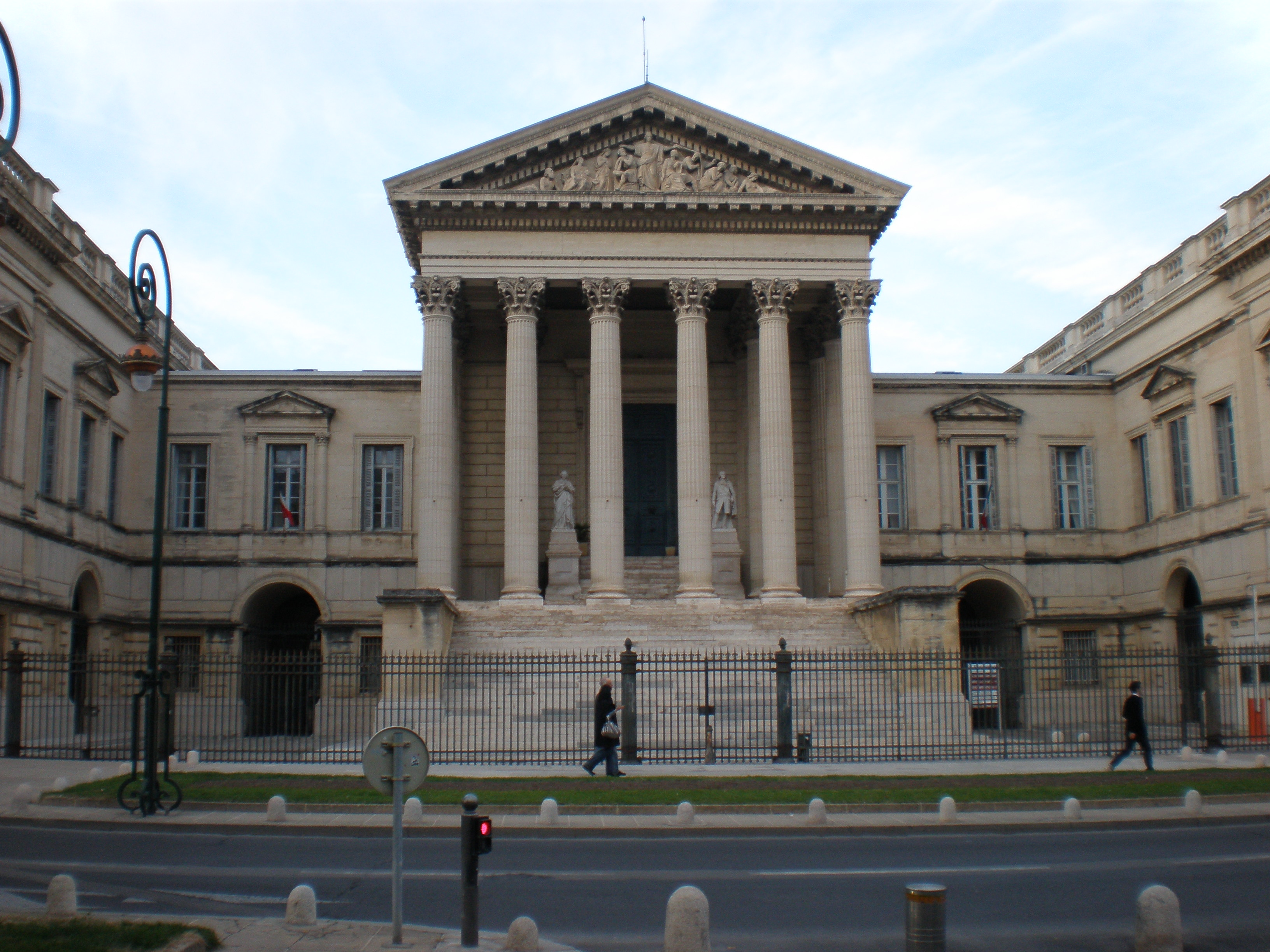 L'ancien Palais de Justice de Montpellier (France), actuel siège de la cour d'appel et de la cour d'assises